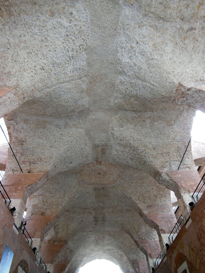 Roma, Mercati di Traiano, volta della "Grande aula"